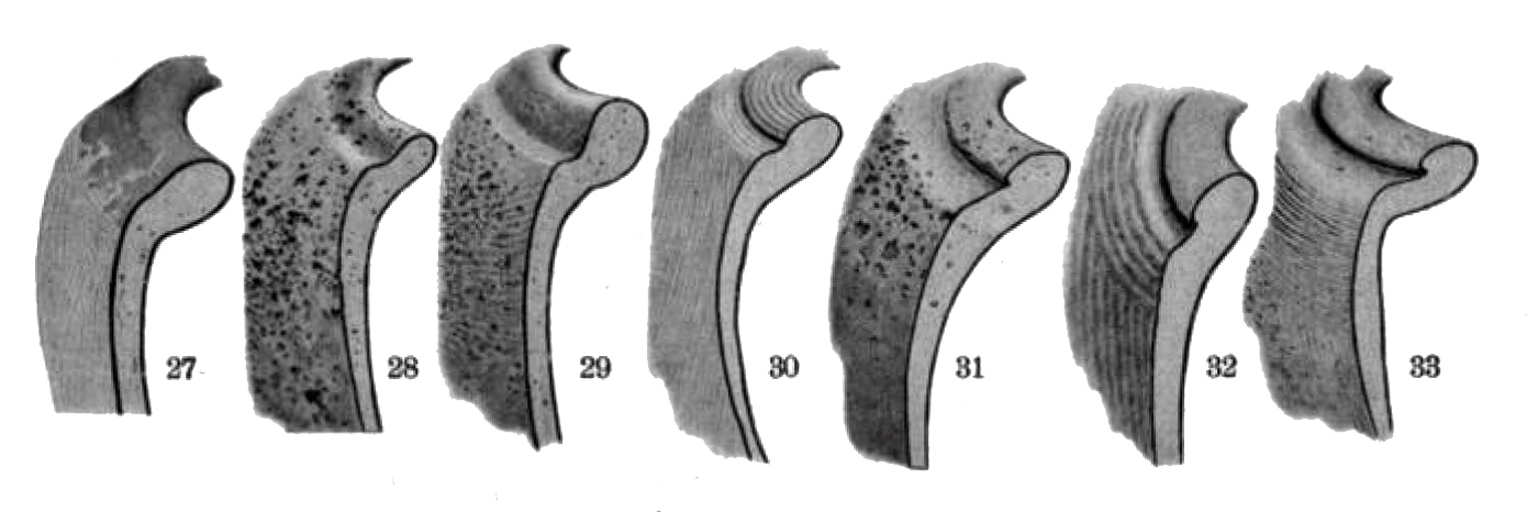 Randformen der Halterner Kochtöpfe nach Ritterling 1901.